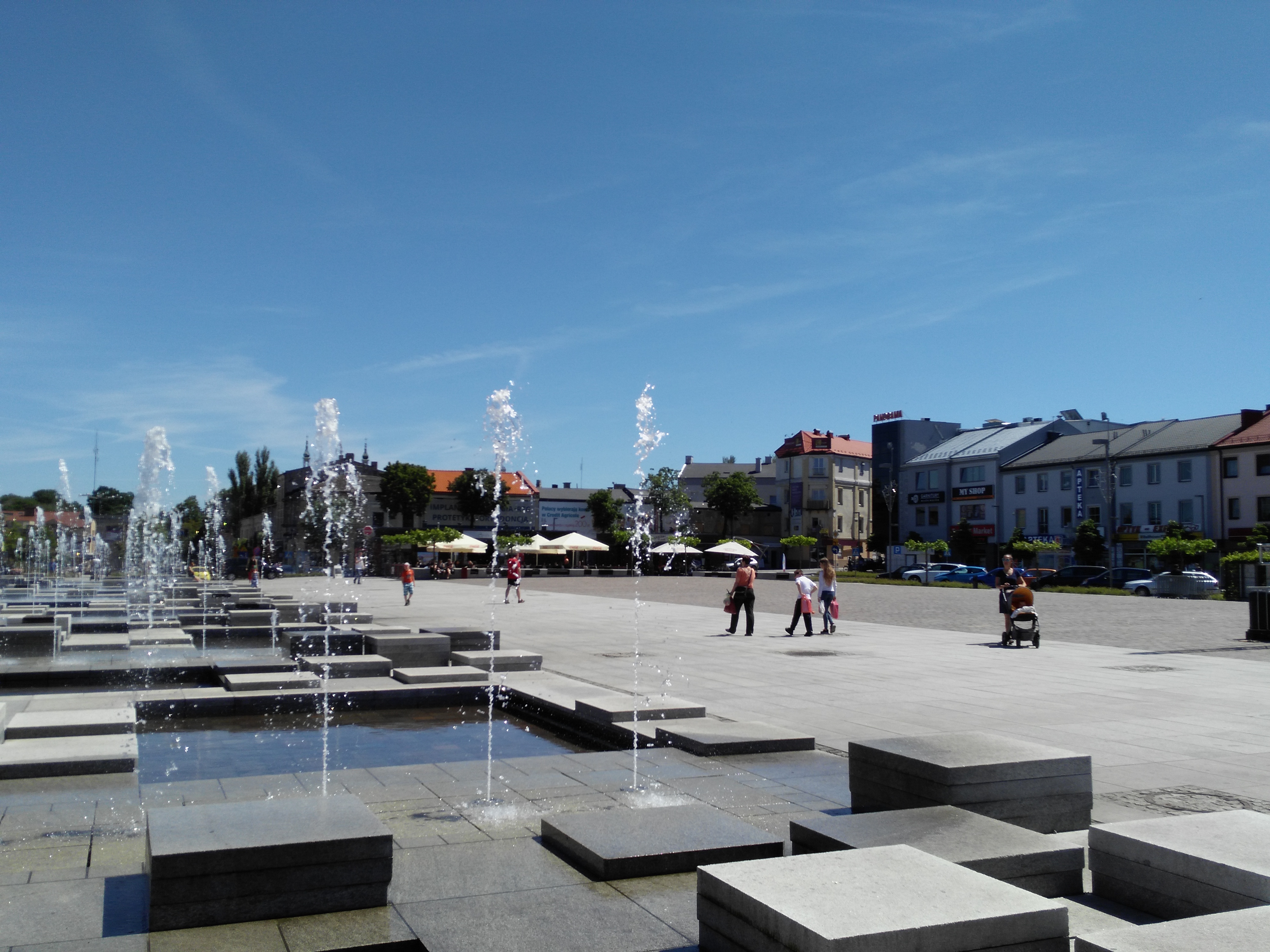 Plac Kościuszki w Tomaszowie Mazowieckim, główny plac miasta